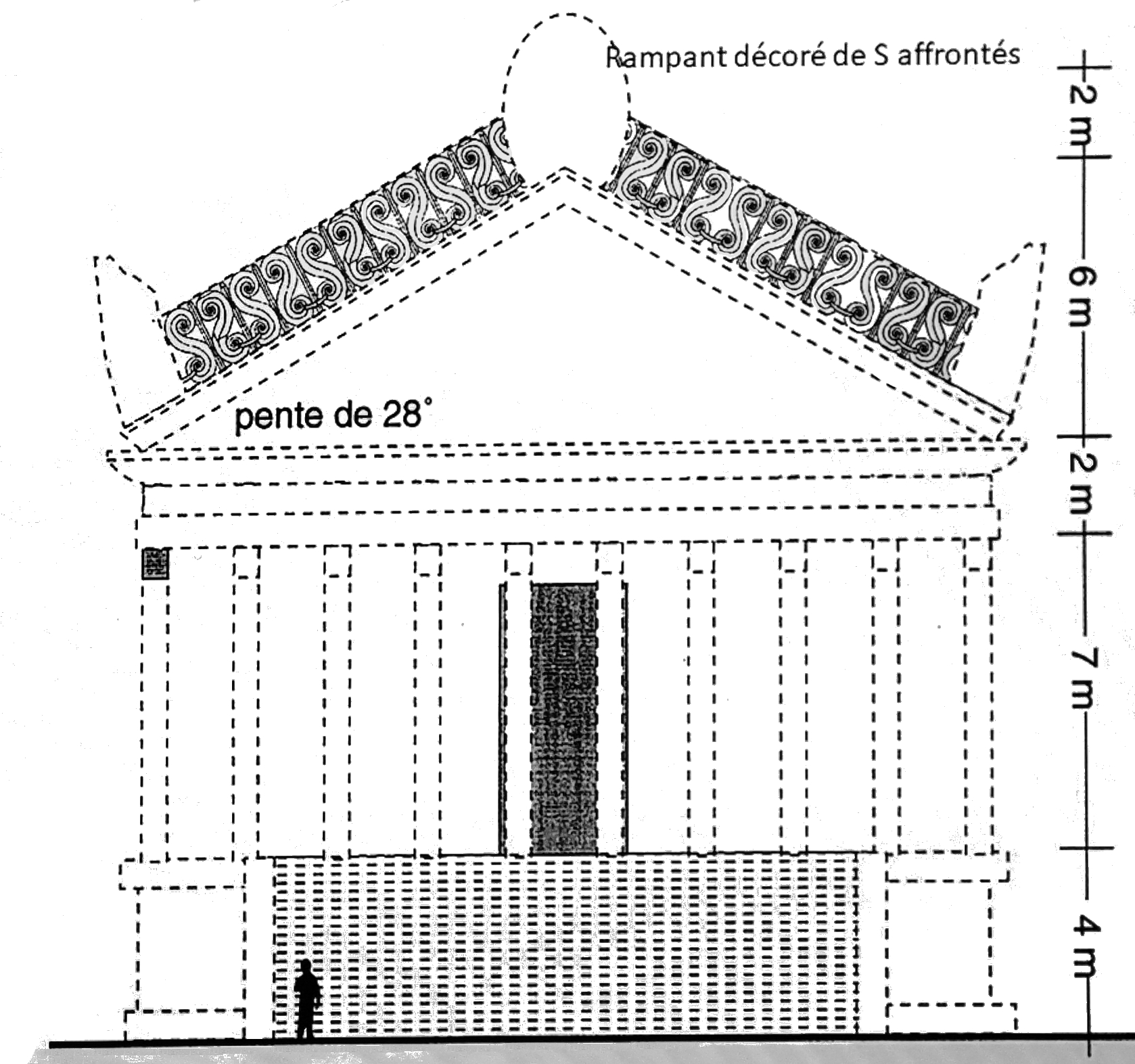 suite à des fouilles archéologiques.